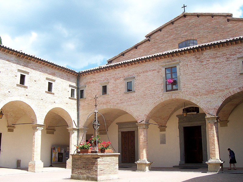 Gubbio - Basilica di S. Ubaldo